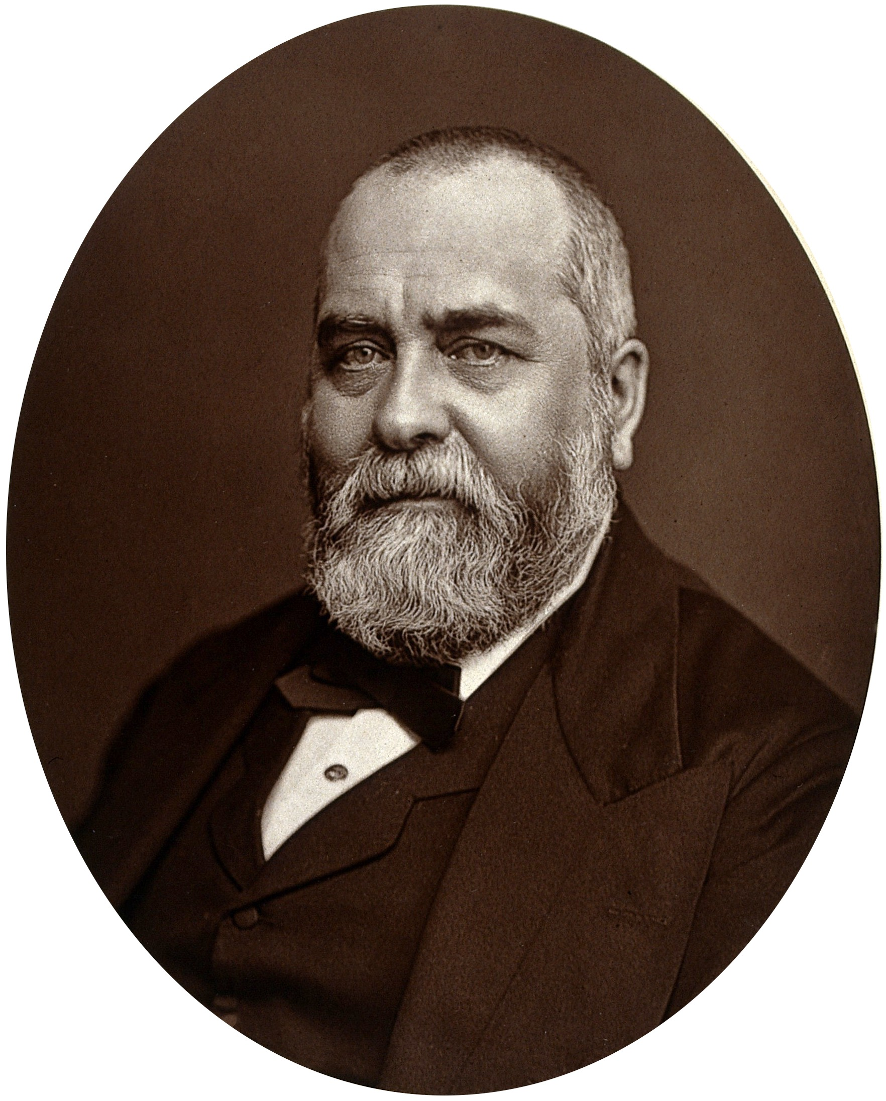 Sir Philip Cunliffe-Owen.